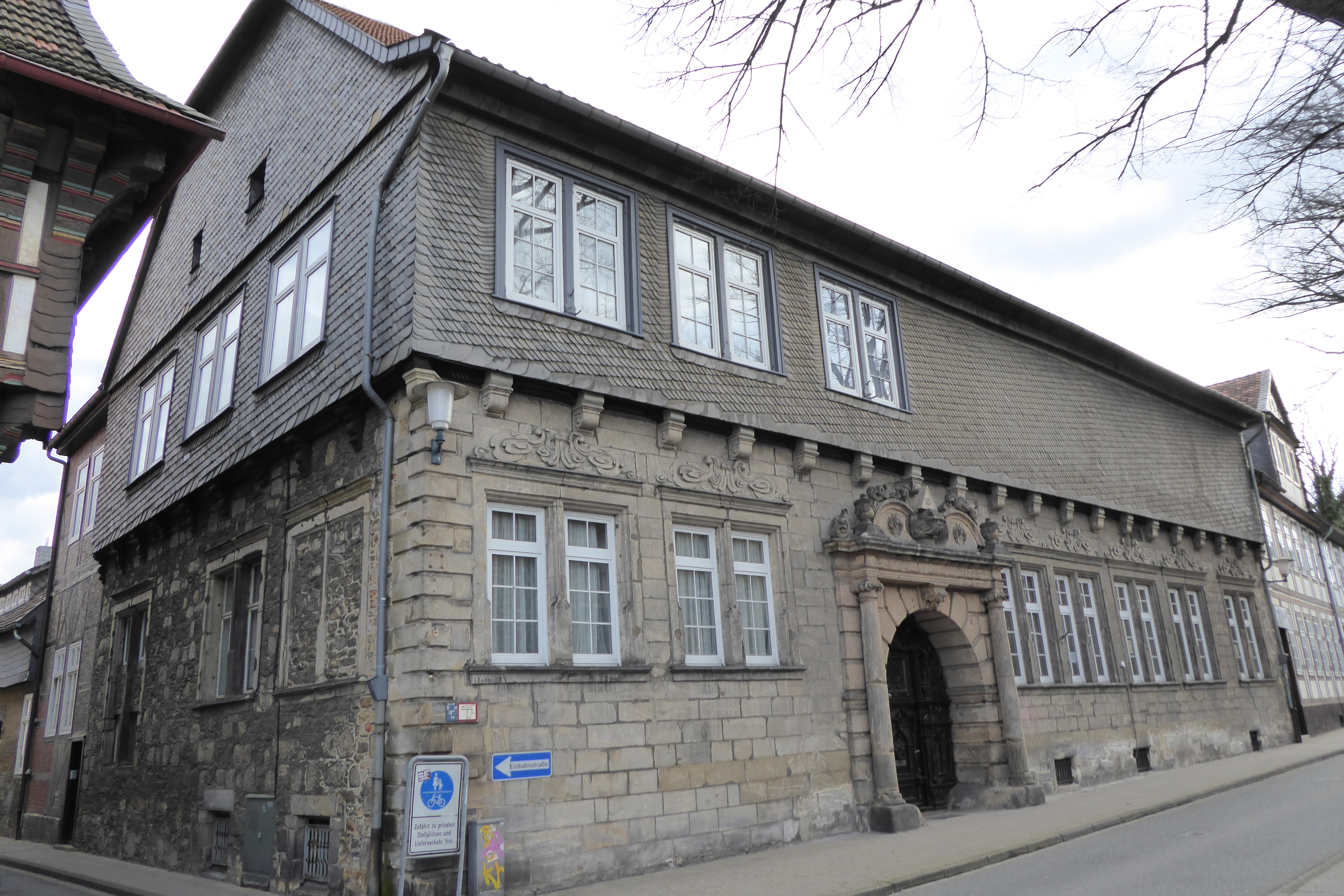 Logenhaus in der Kornstraße 8 in Goslar; die Altstadt ist als Welterbe geschützt